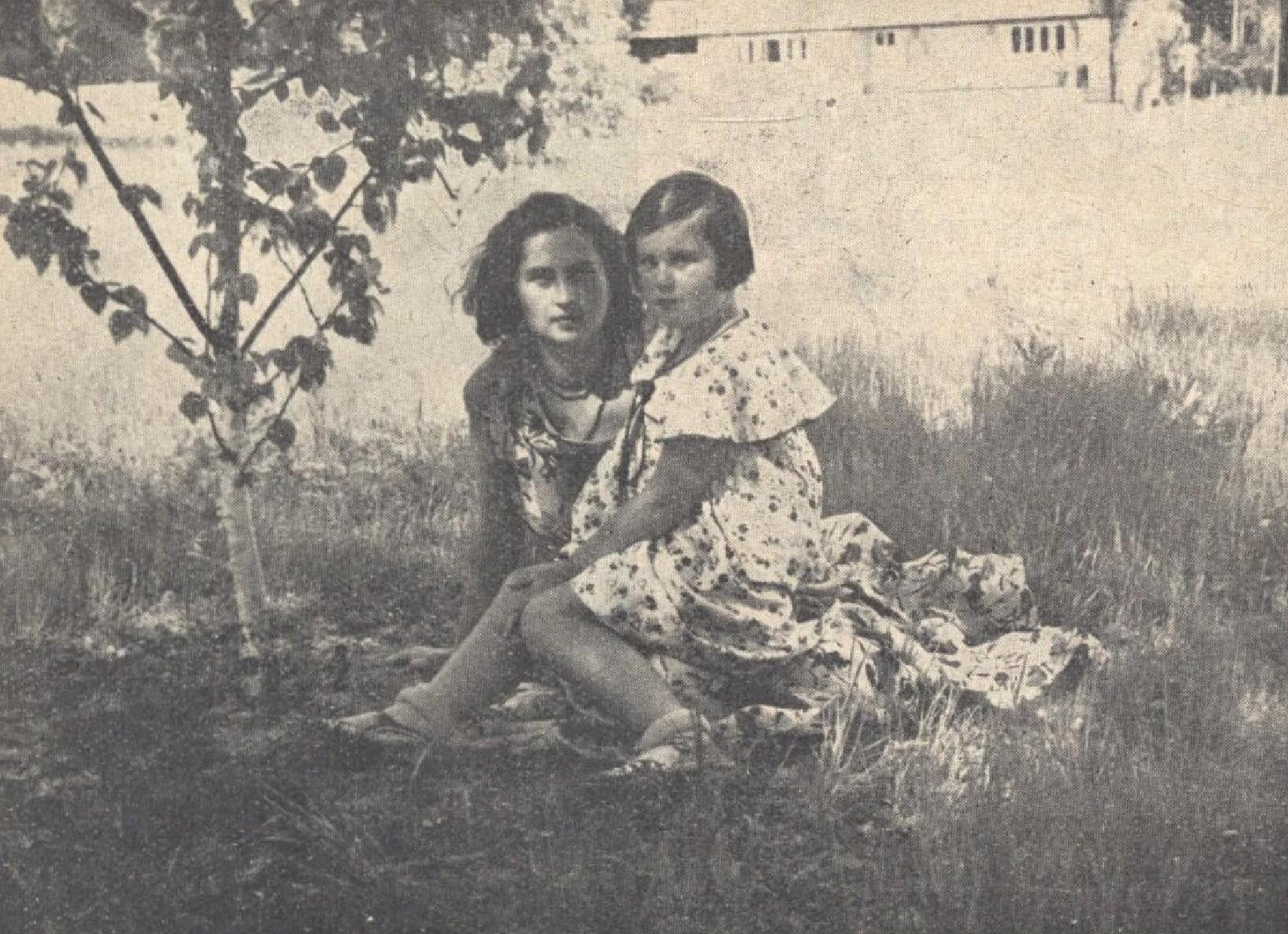 Joža Götzová (1898-1989), česká dramatička, spisovatelka a překladatelka